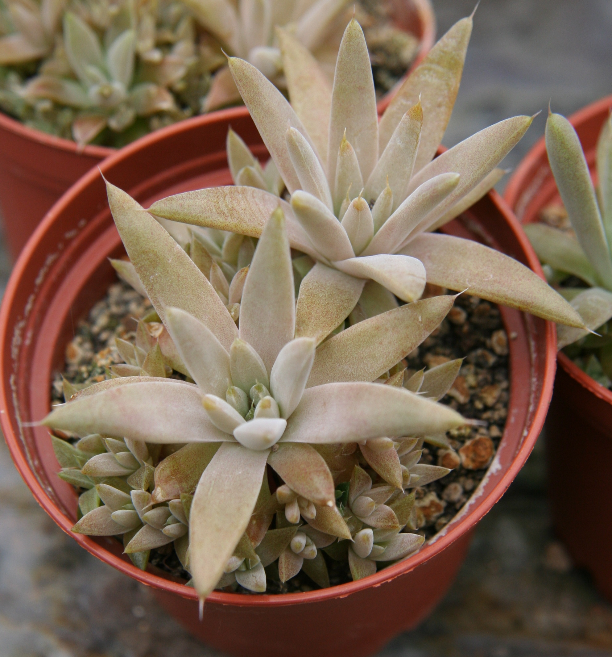 Orostachys fimbriata in der Gärtnerei Flores-Reinecke, Leverkusen